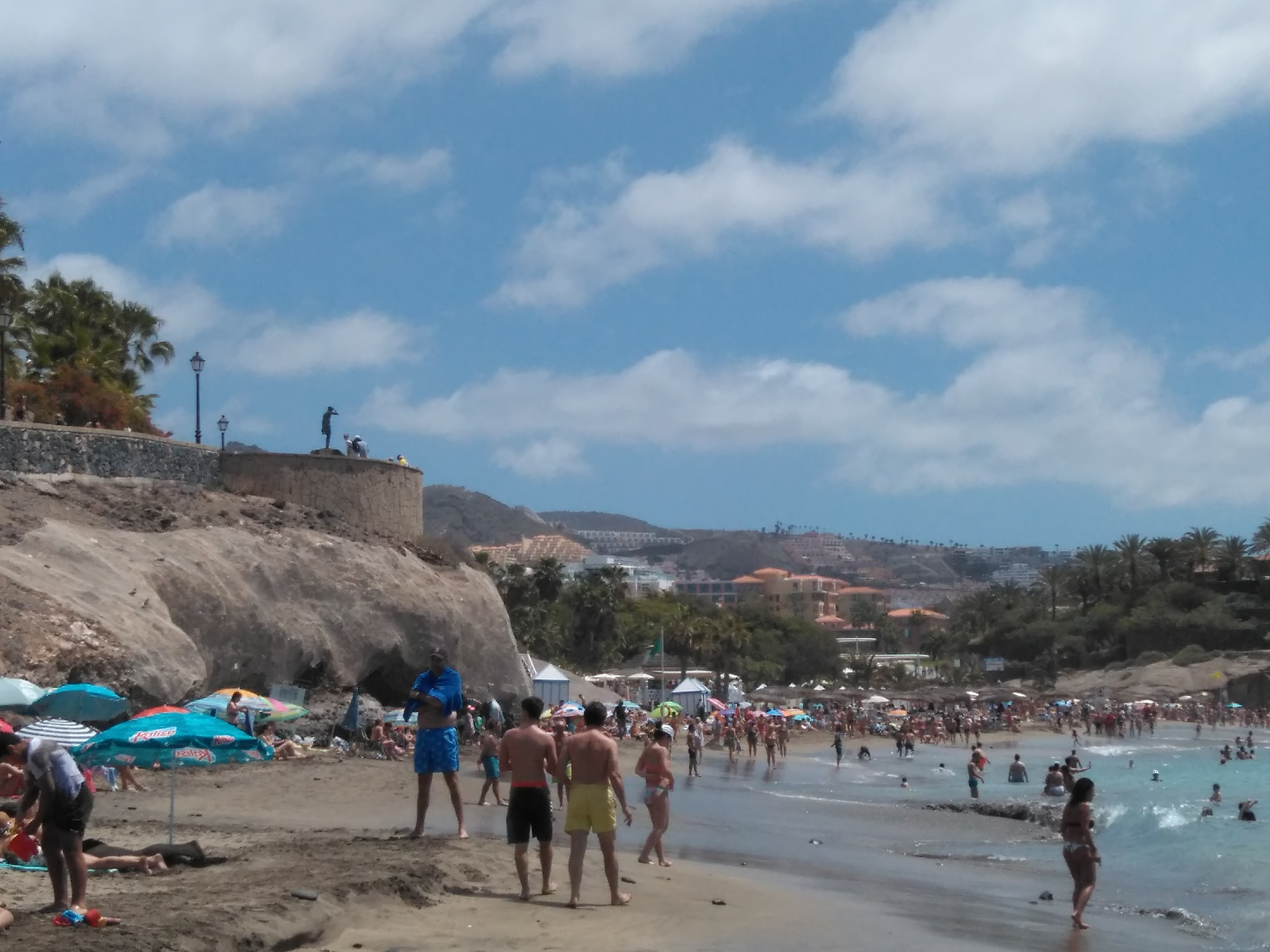 playa El Duque, Adeje con monumento a Javier Pérez Ramos sobre el mirador